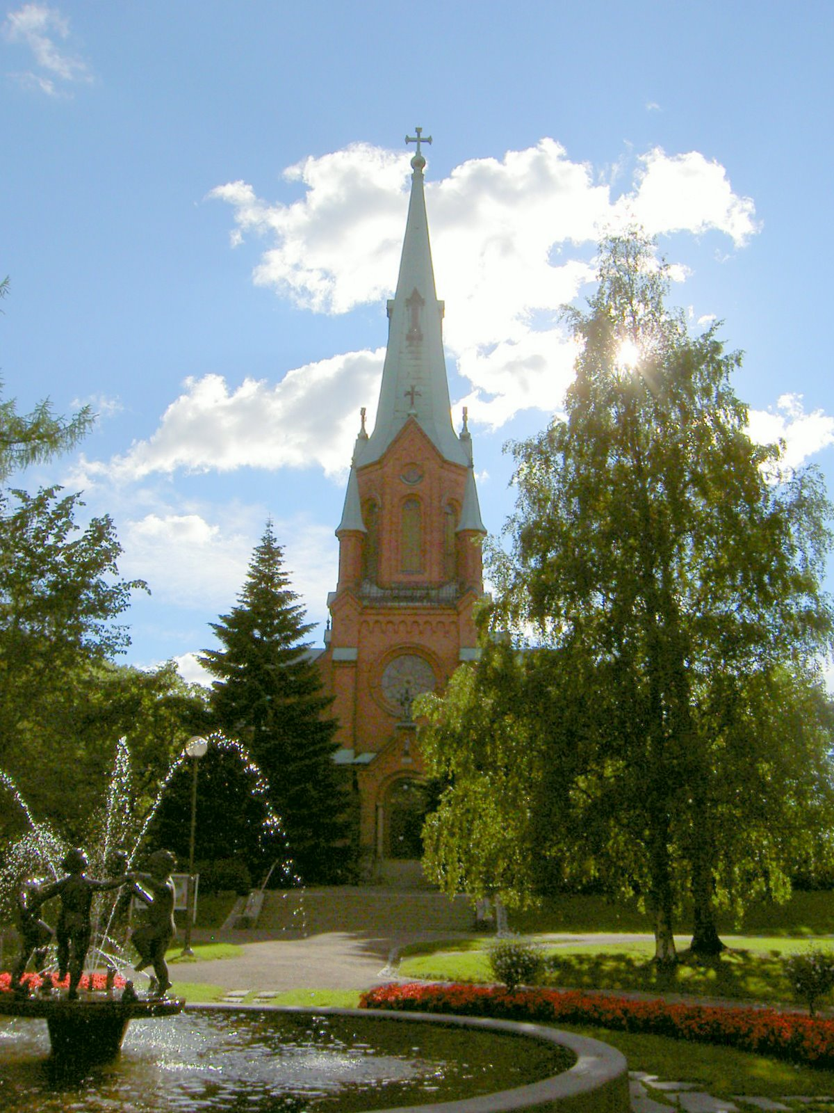 Alexander Church in Tampere, Finland